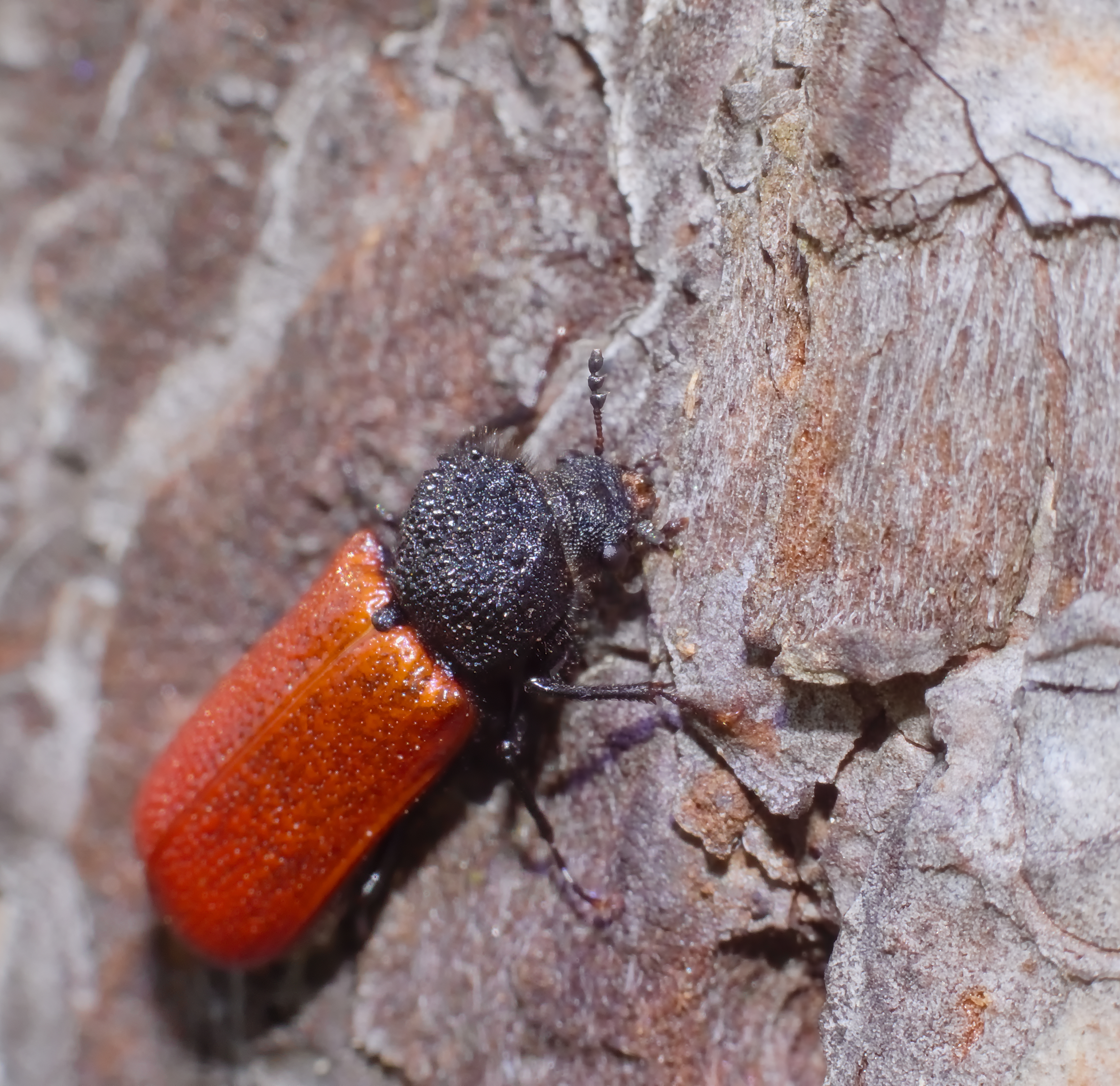 Karminroter Kapuzinerkäfer - Bostrichus capucinus. Aufgenommen in der Viernheimer Heide, Viernheim, Hessen, Deutschland.